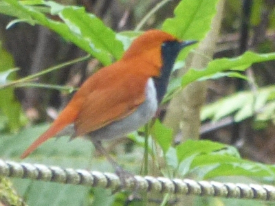 アカヒゲ Luscinia komadori のオス（沖縄県国頭村）